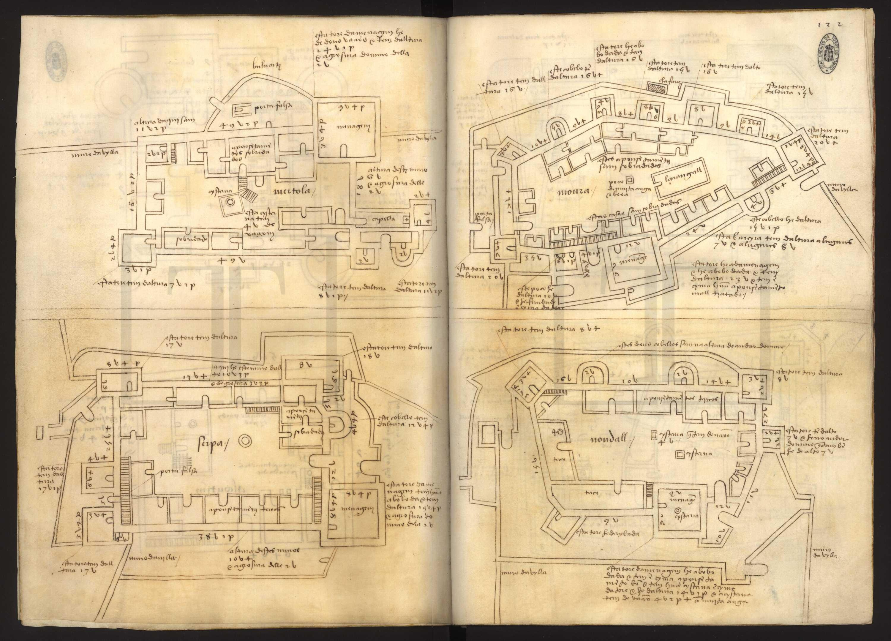 Livro das Fortalezas 122- Mértola, Serpa, Moura, Noudar (plantas)